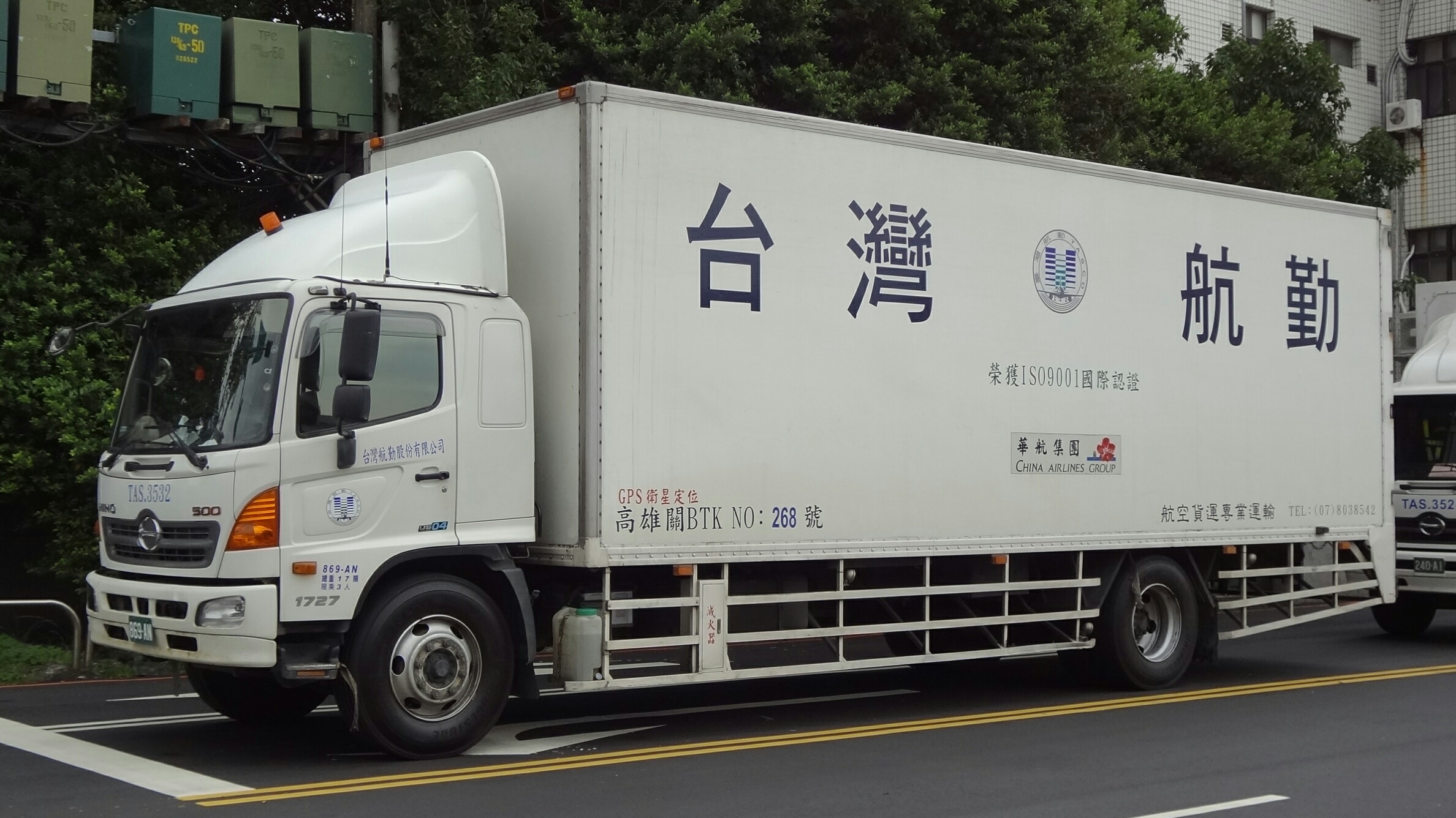 中文（台灣）: 臺灣航勤日野500大貨車869-AN。